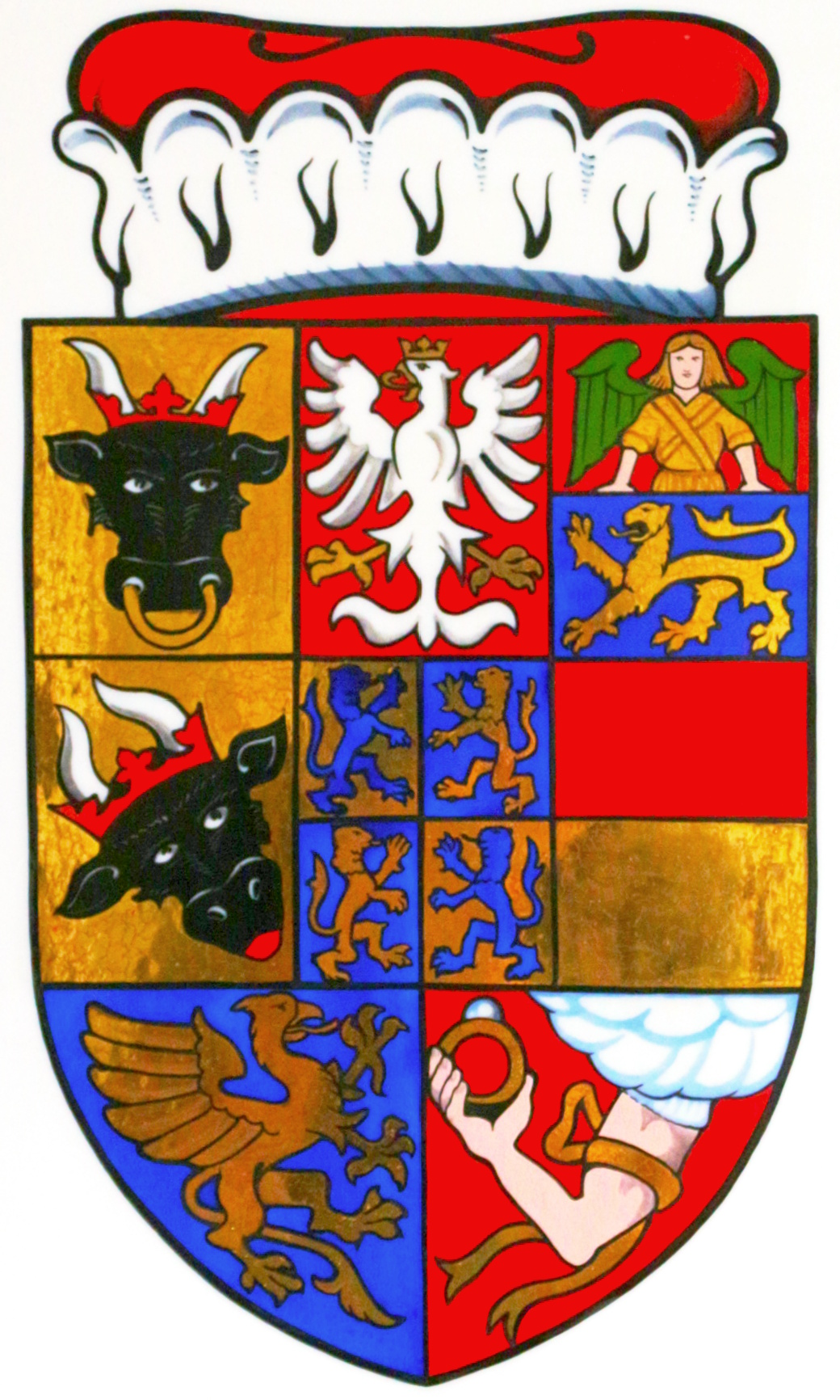 Erb Valštejnů, vévody frýdlantského a zaháňského